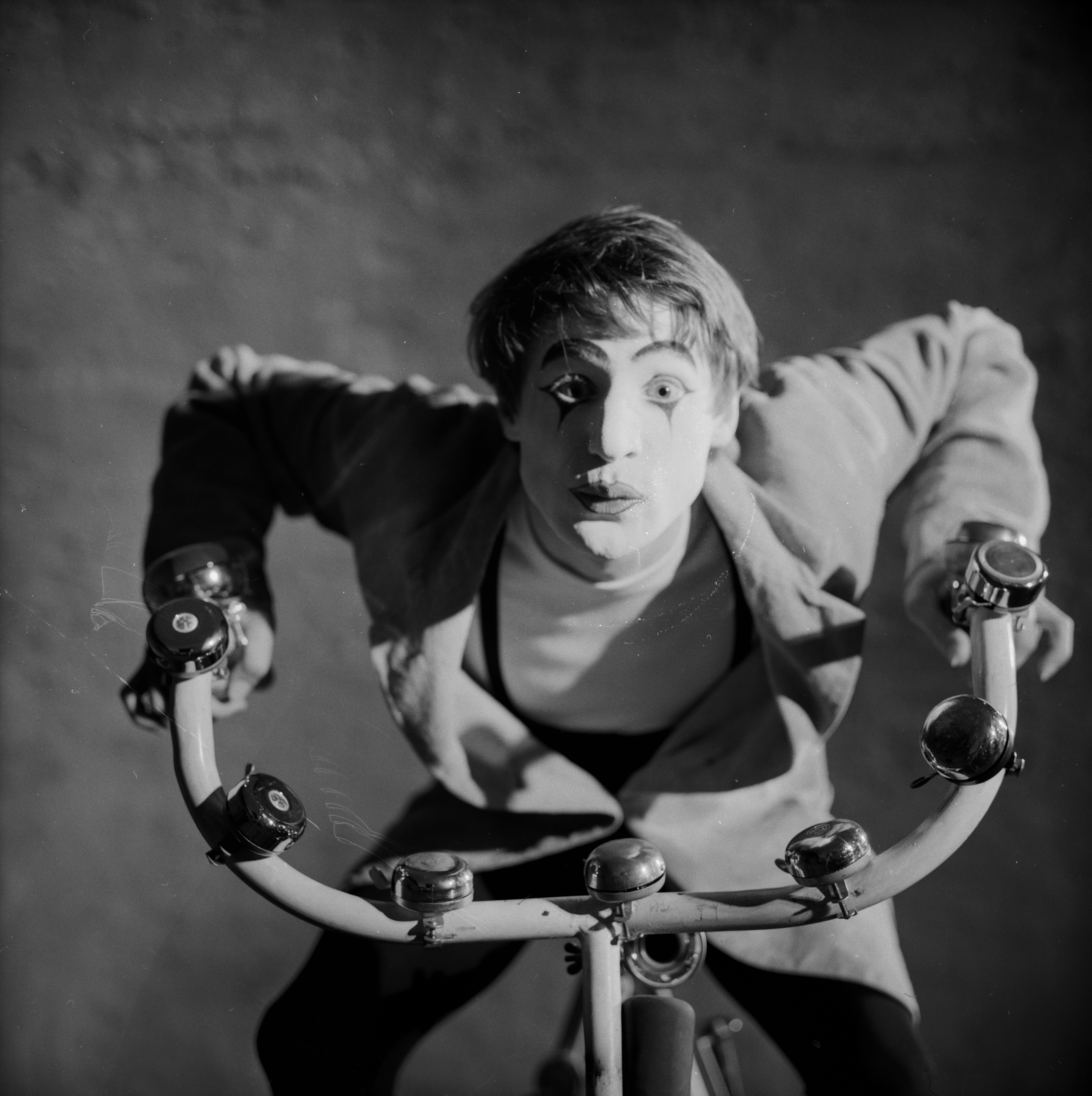 Dimitry Ascona, Schweiz, 1962. Reportage mit 12 Bildern